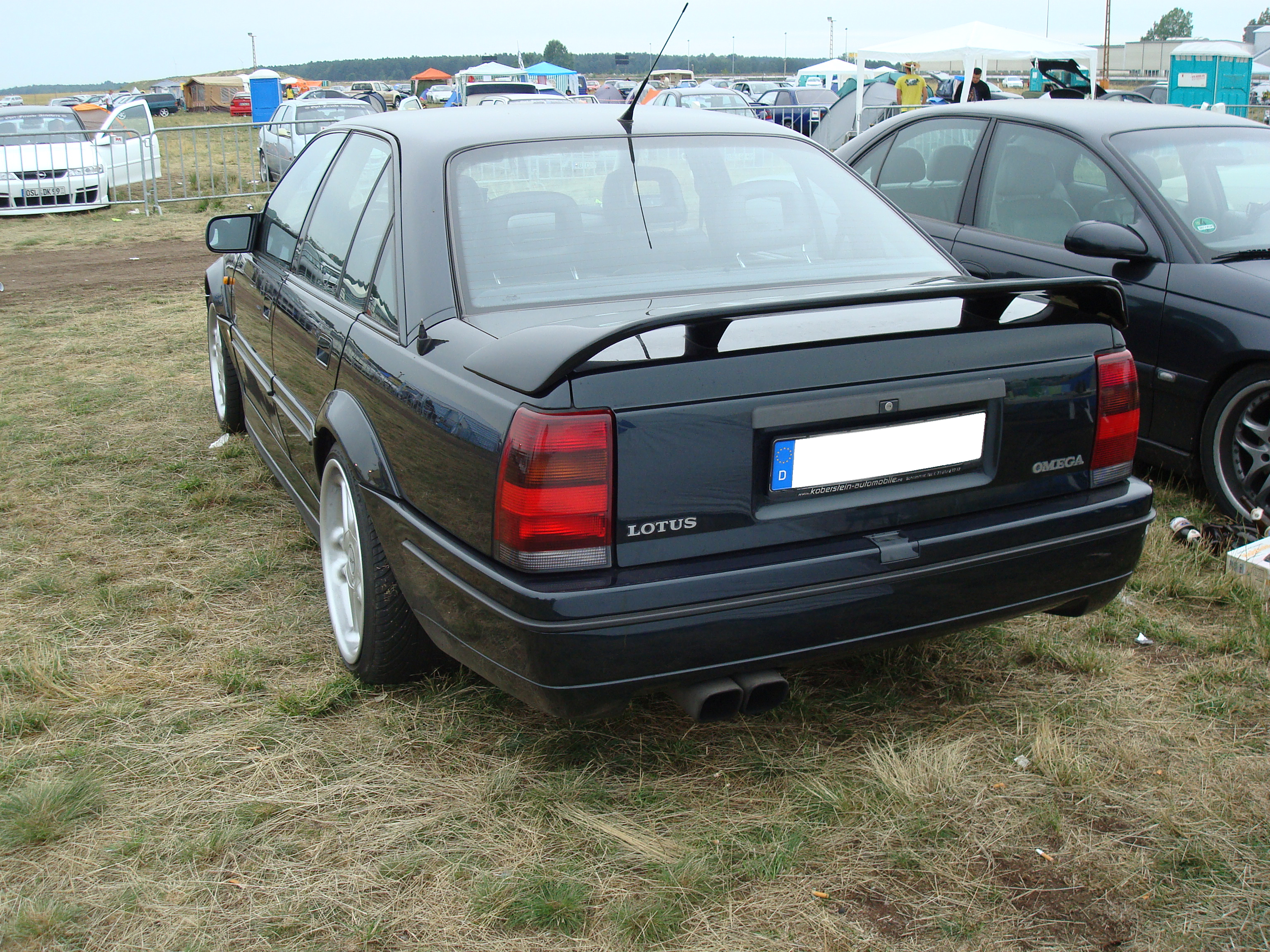 Heck des Lotus Omega